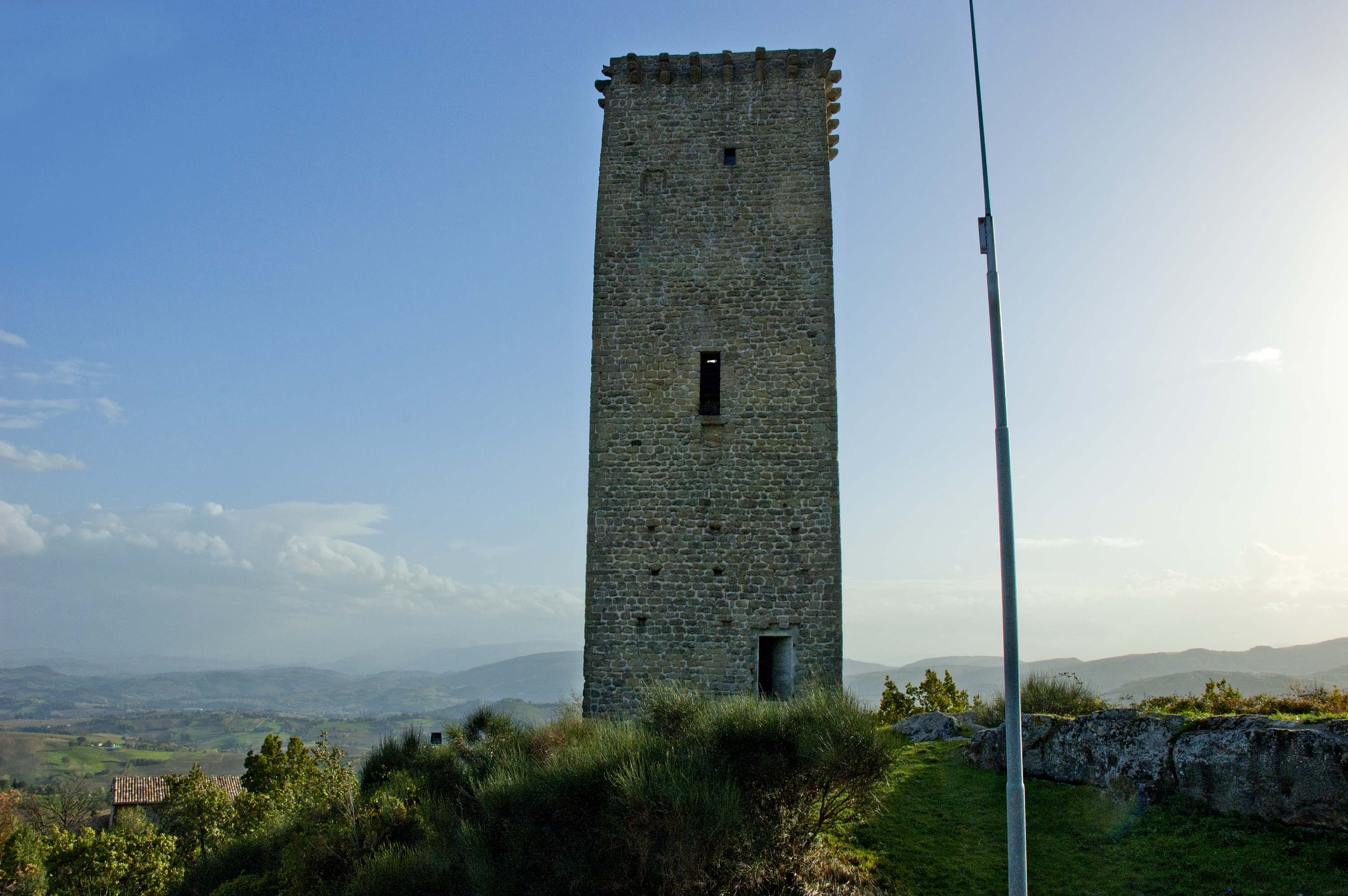 ALIFORNI